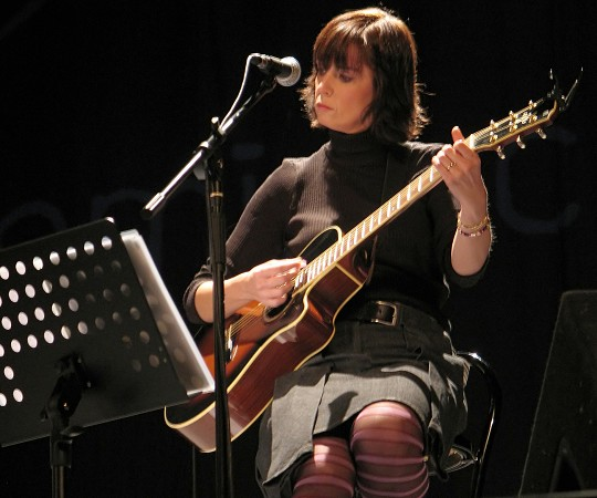 Cristina Donà in concerto al Teatro Astoria di Lerici (SP), 3 dicembre 2004